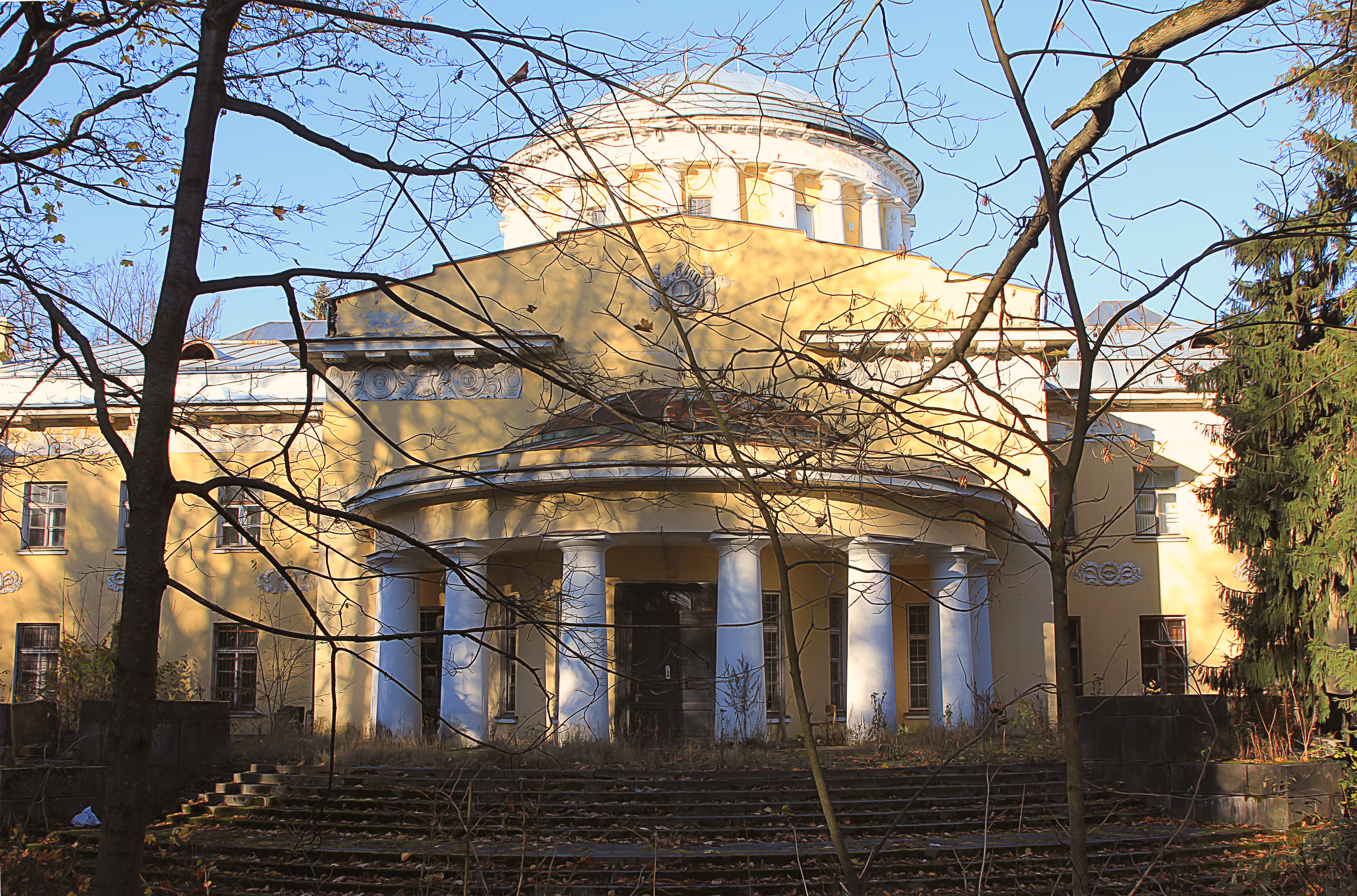 Большой дворец (Санкт-Петербург и Лен.область, Санкт-Петербург, Шуваловский парк)